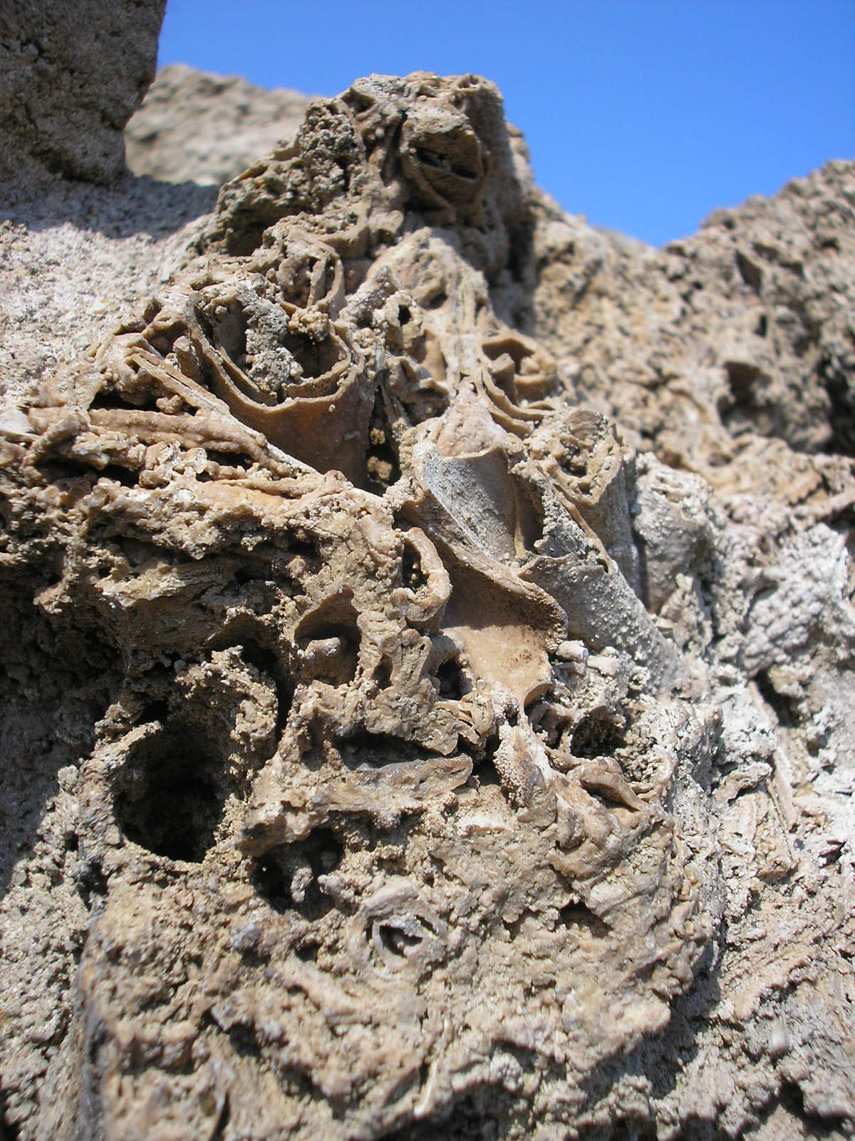 Nahaufnahme eines verwitterten Travertin-Steins der Stadtmauer in Bad Langensalza (Thüringen).